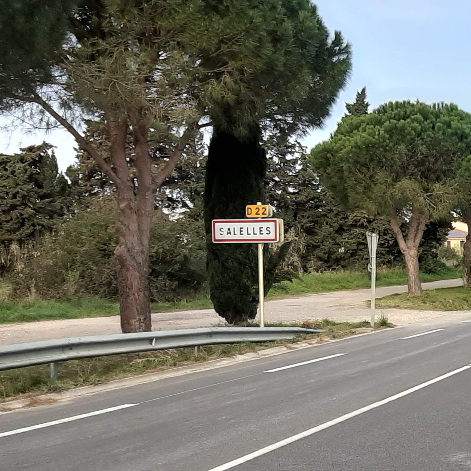 Rètol a l'entrada de Salelles amb el nom del municipi.